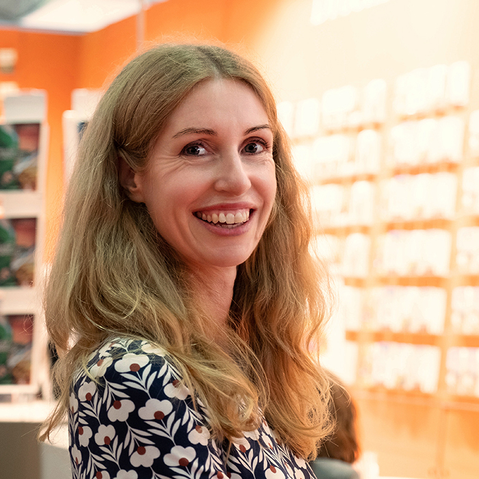 Ulrike Scheuermann, Frankfurter Buchmesse 2019